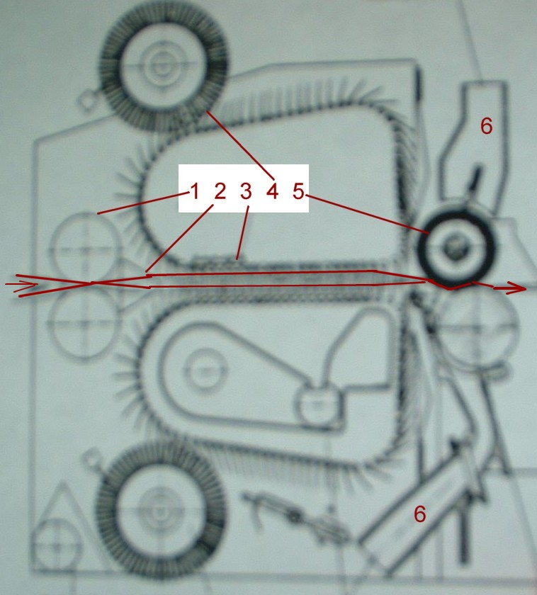 Schema: Doppelnadelstab-Streckwerk